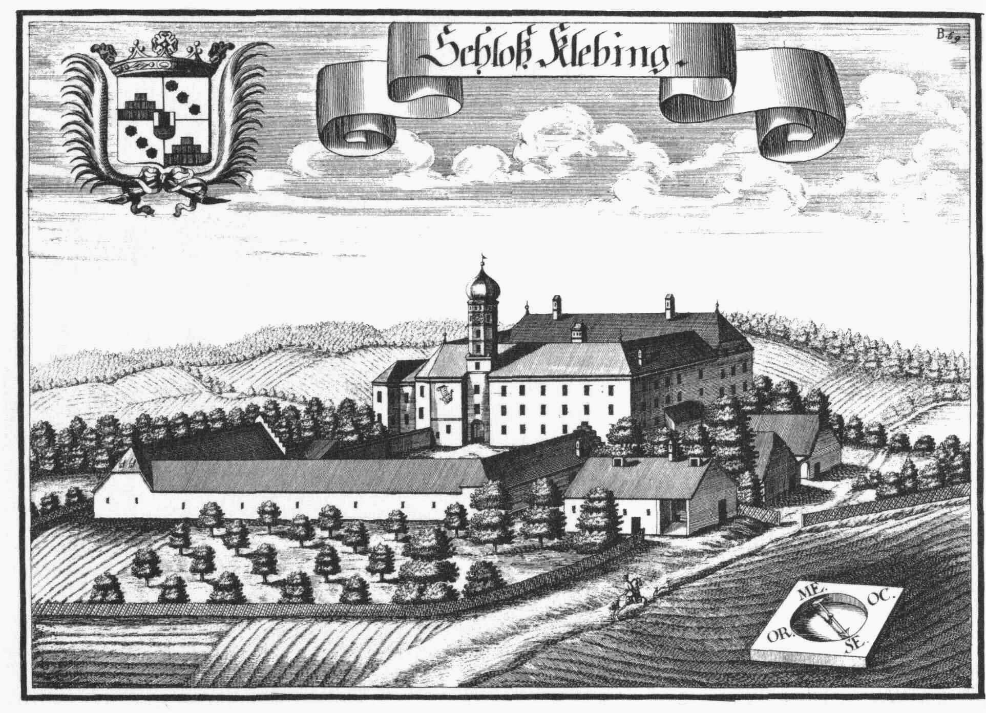 Schloss Klebing nach einem Stich von Michael Wening von 1721